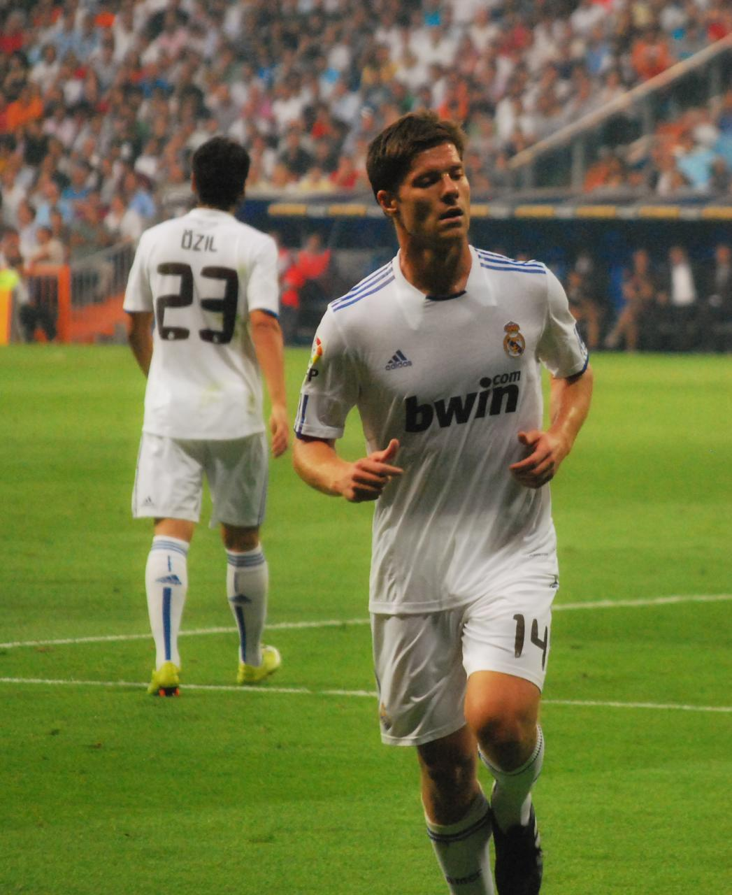 Real Madrid 1 - Osasuna 0 11 de septiembre 2010